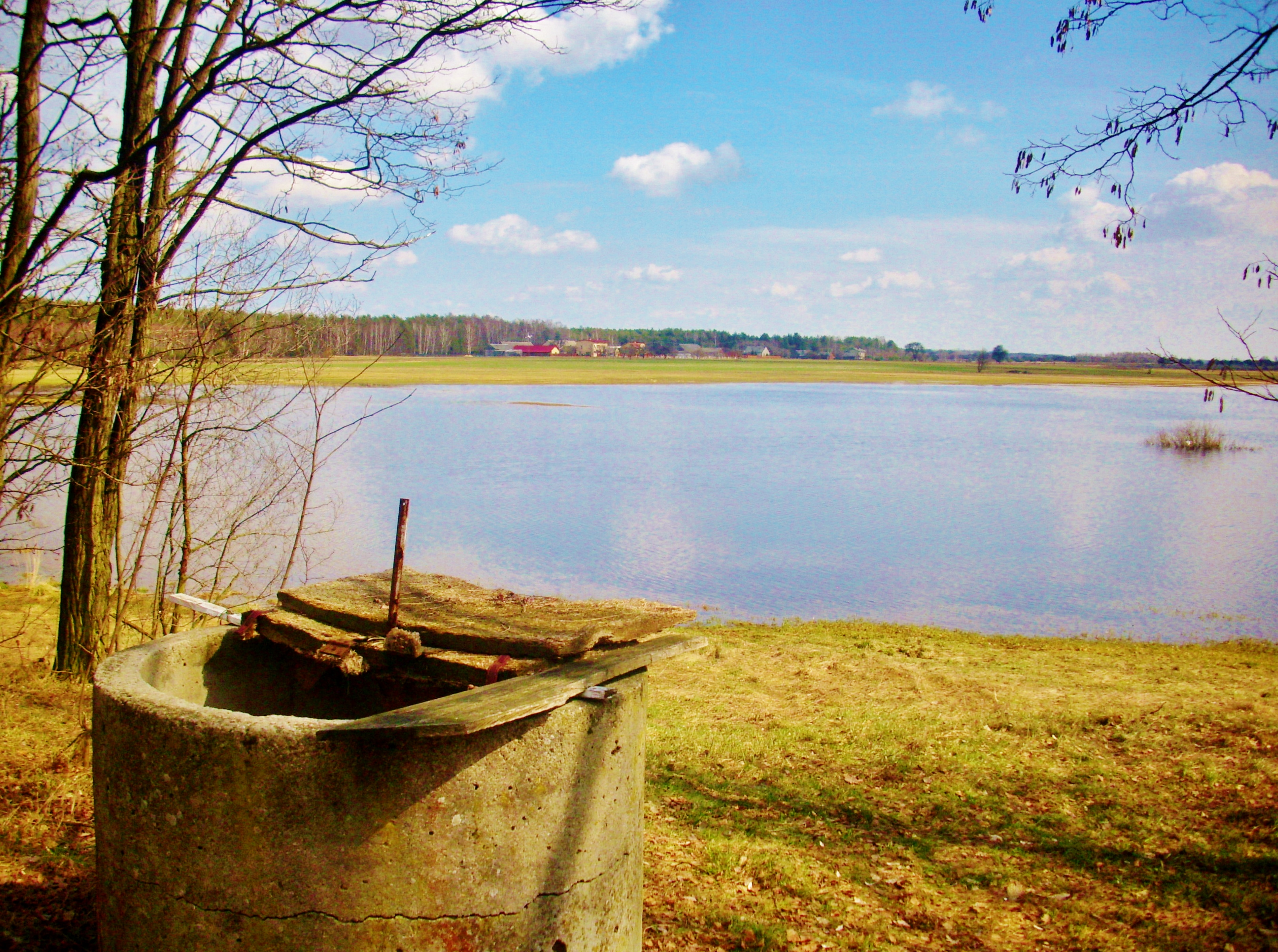 Jezioro Okresowe, które osiągnęło 80 ha powierzchni tafli wody. Powstaje po roztopach zimowych lub długich deszczach i utrzymuje się przez 2-4 miesiące w roku.